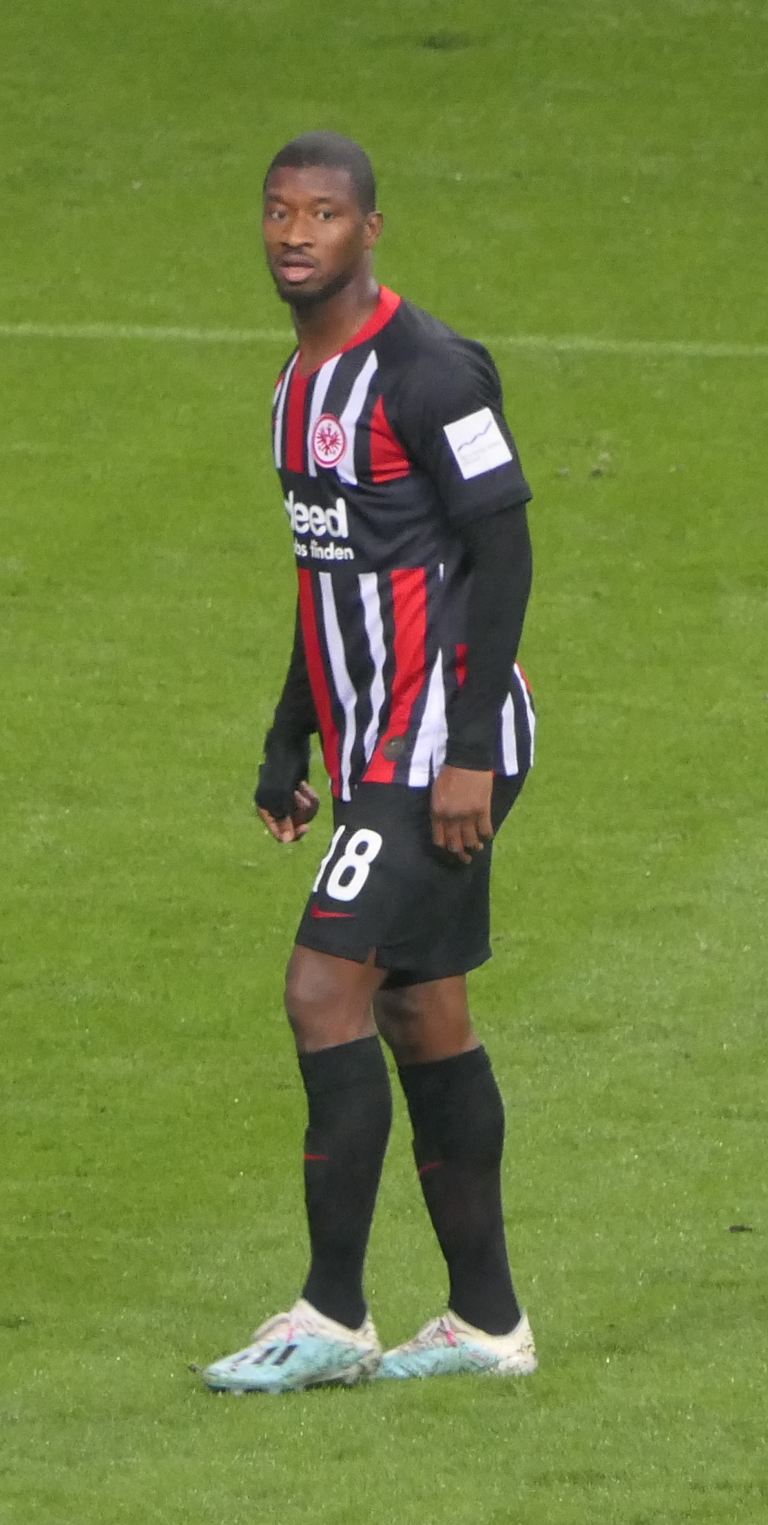 Der Fussballprofi Almamy Touré im Trikot von Eintracht Frankfurt beim Heimspiel gegen den SV Werder Bremen am 06.10.2019.